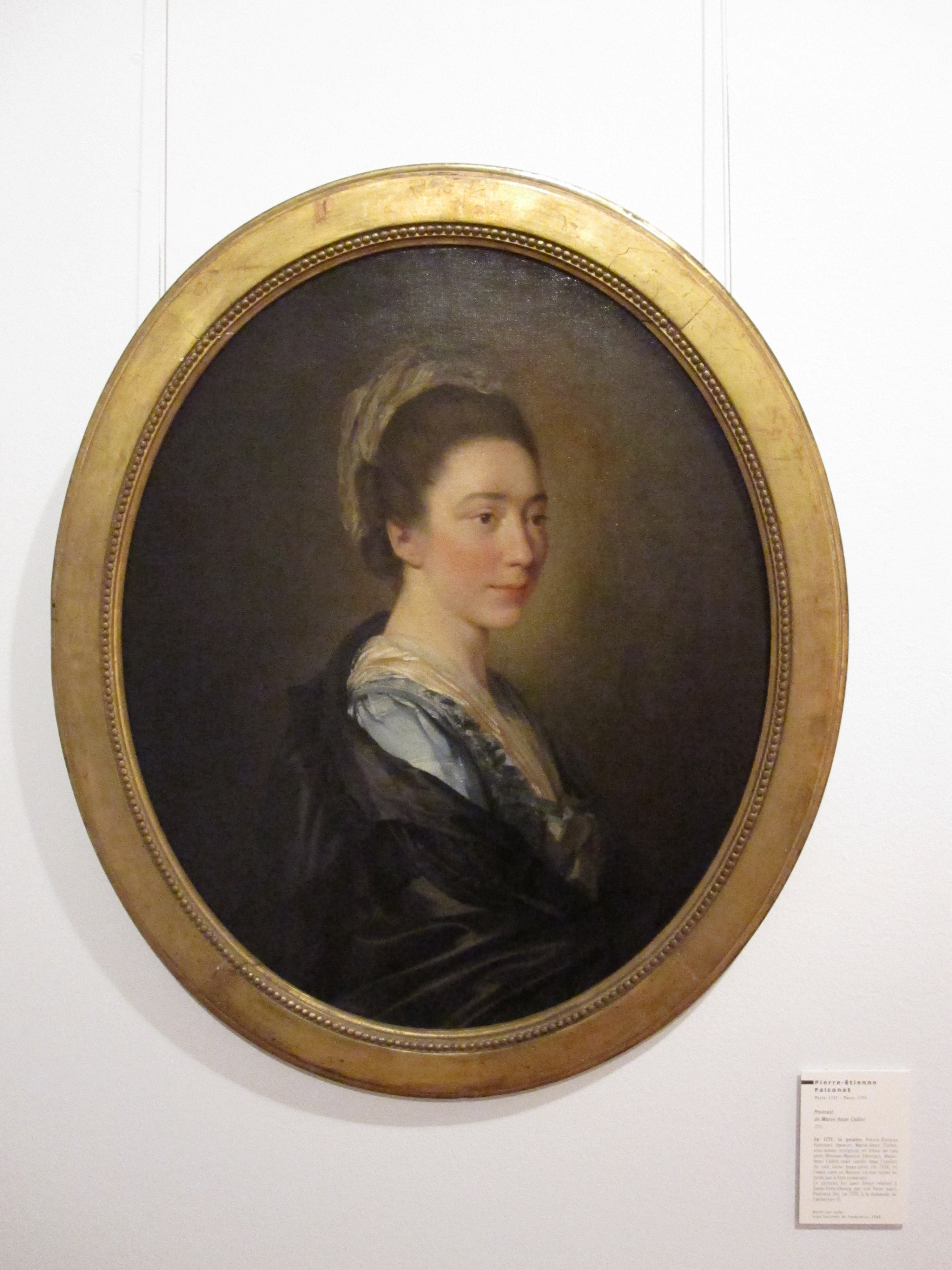 Portait de l'épouse de l'artiste.